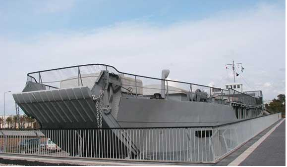 אוניית המעפילים אף על פי כן, במוזאון ההעפלה וחיל הים בחיפה